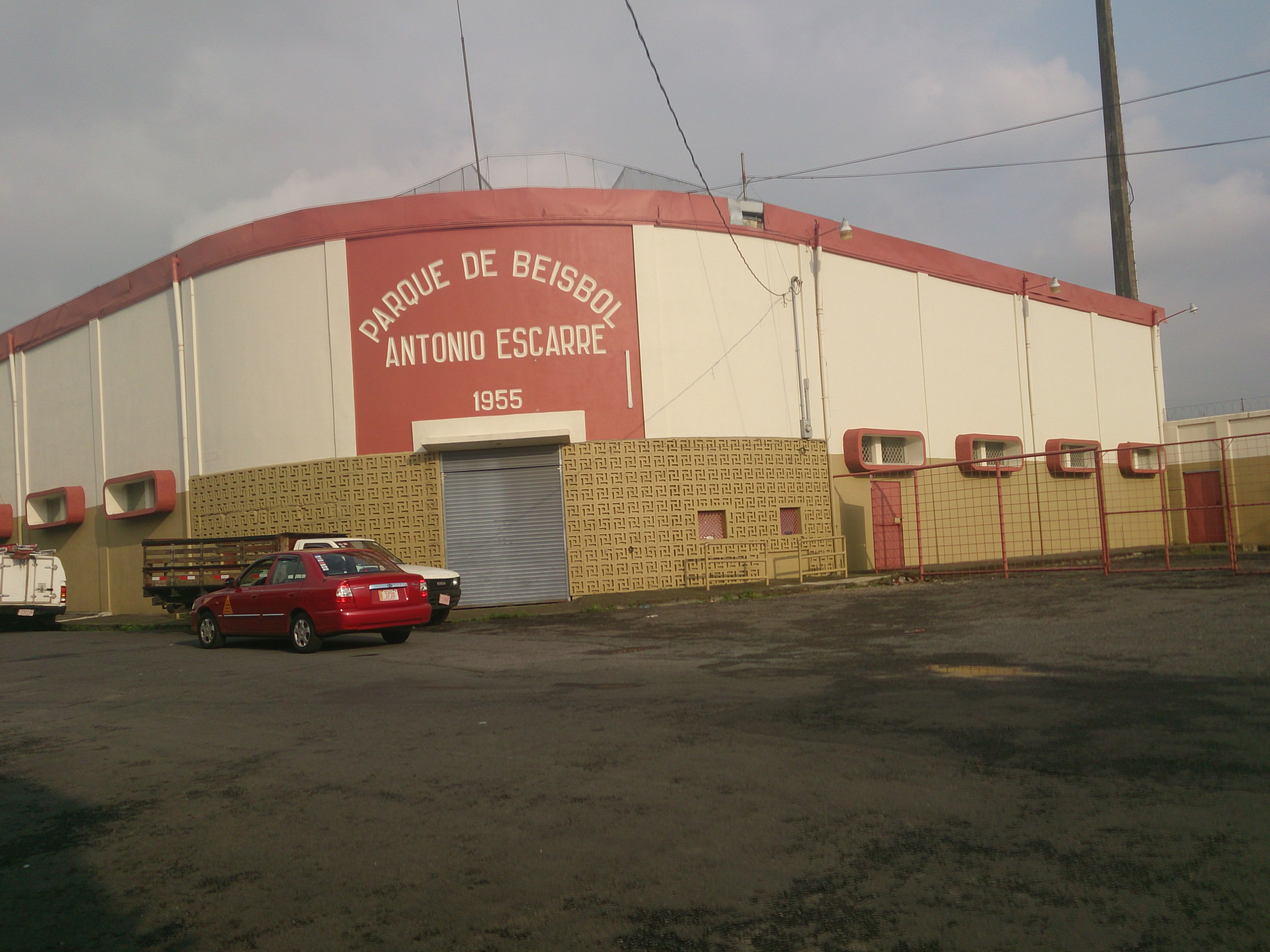 Parque de Béisbol Antonio Escarre